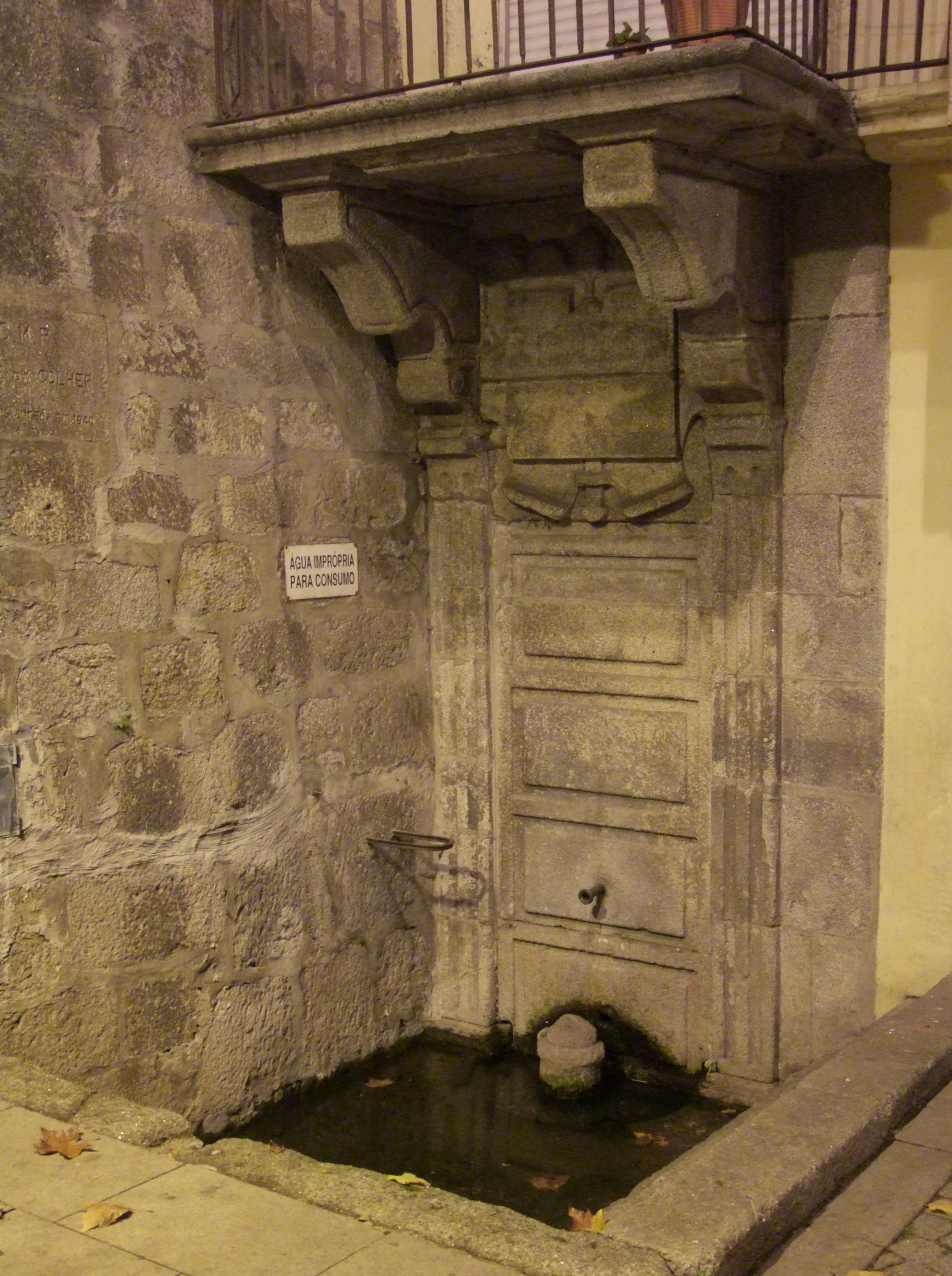 Chafariz da Colher, Miragaia, Porto, Portugal (DSCF2111)